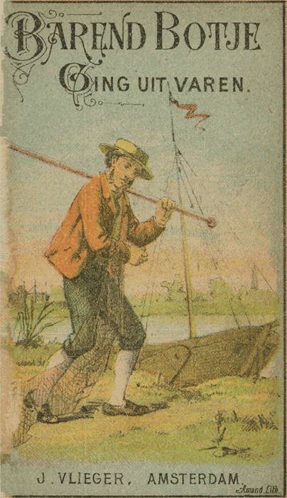 Berend Botje gaat uit varen